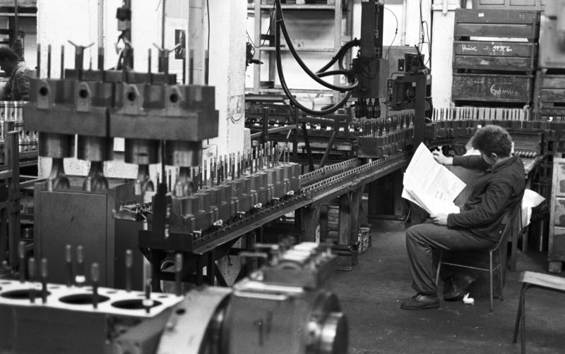 Nordhausen, Kurzarbeit ADN/ Ralph Hirschberger/ 1.10.90 Bez. Erfurt: Kurzarbeit Herrscht bald Ruhe in den Montagehallen der IFA-Dieselmotorenwerk Nordhausen GmbH? Fest steht bereits, daß ab Oktober jeder zweite der insgesamt 3.300 Beschäftigten des Unternehmens kurzarbeiten wird. Für 25.000 Motoren, die an die Ludwigsfelder Lkw-Bauer geliefert werden sollten, besteht kein Bedarf mehr.